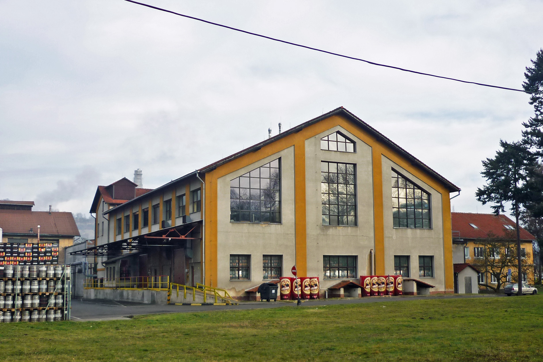 Brauerei in Großpriesen (Velké Březno)